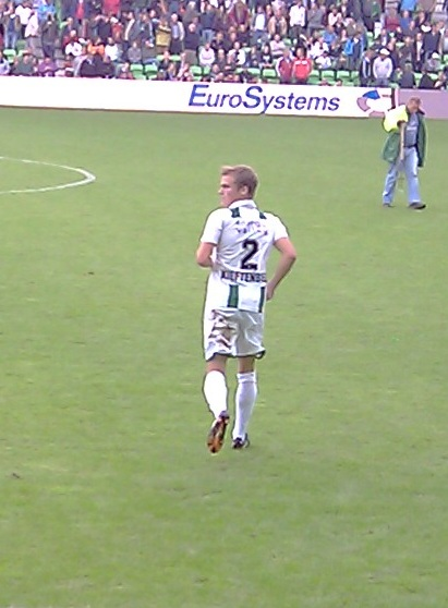 Maikel Kieftenbeld op het veld in de Euroborg 28 Augustus 2011